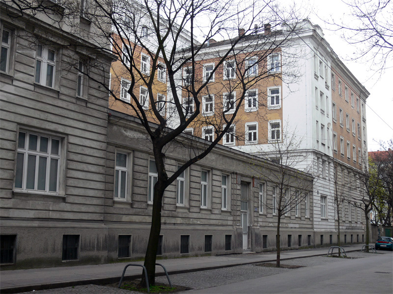 Männerwohnheim Meldemannstraße 27, Wien, Österreich